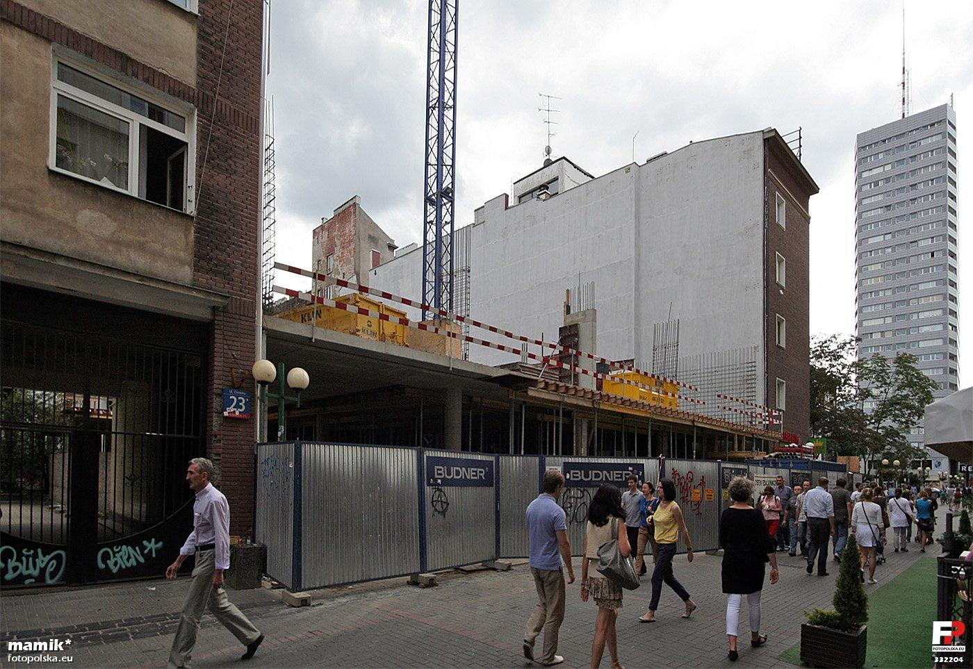 Powstaje nowy budynek "Chmielna 25"